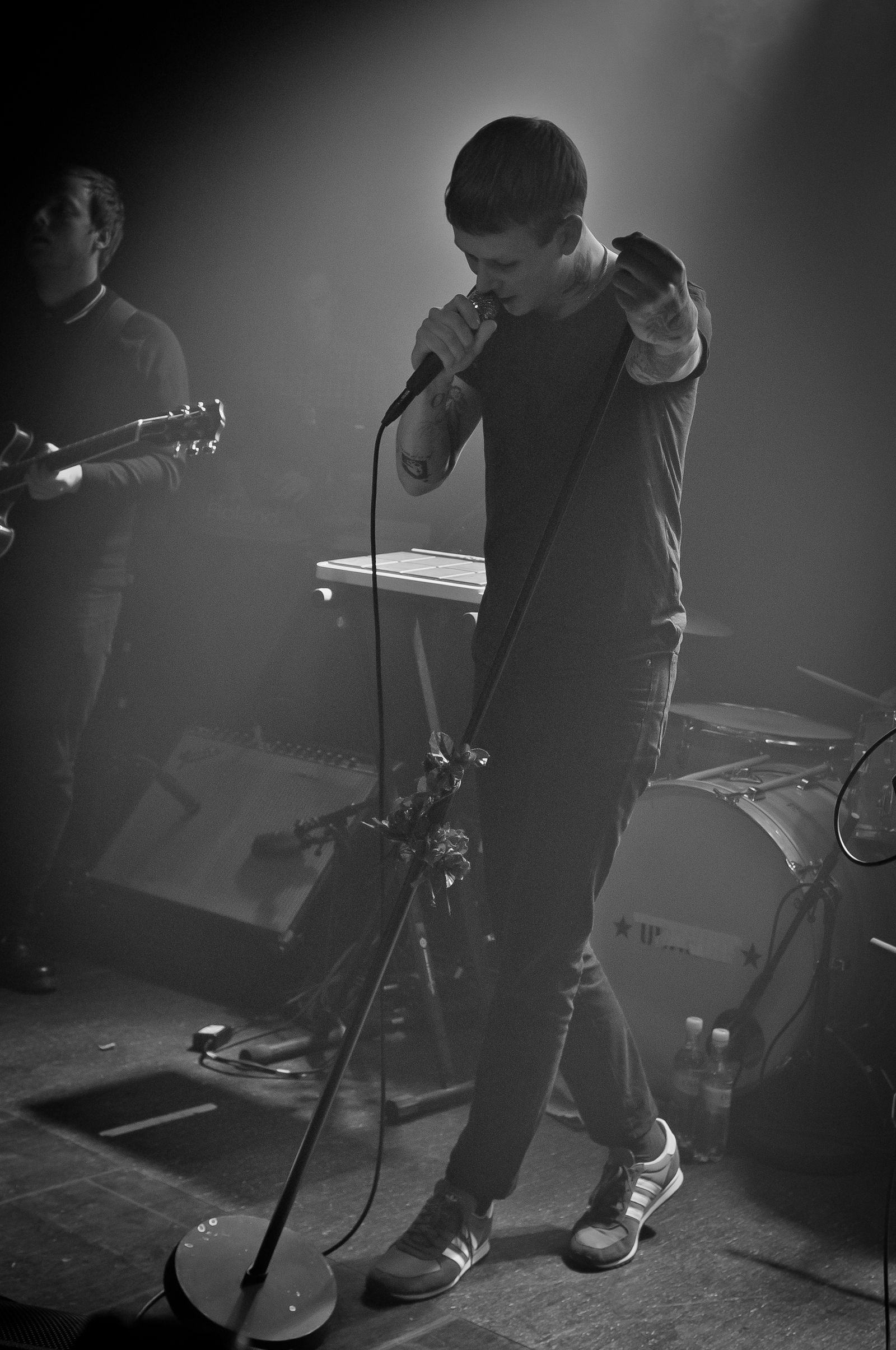 John Olav Nilsen & Gjengen på Total 2012